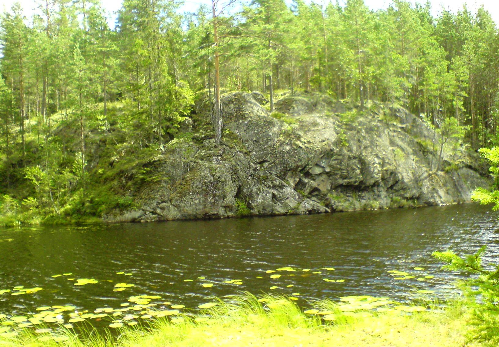 Berget i Store Liertjern.